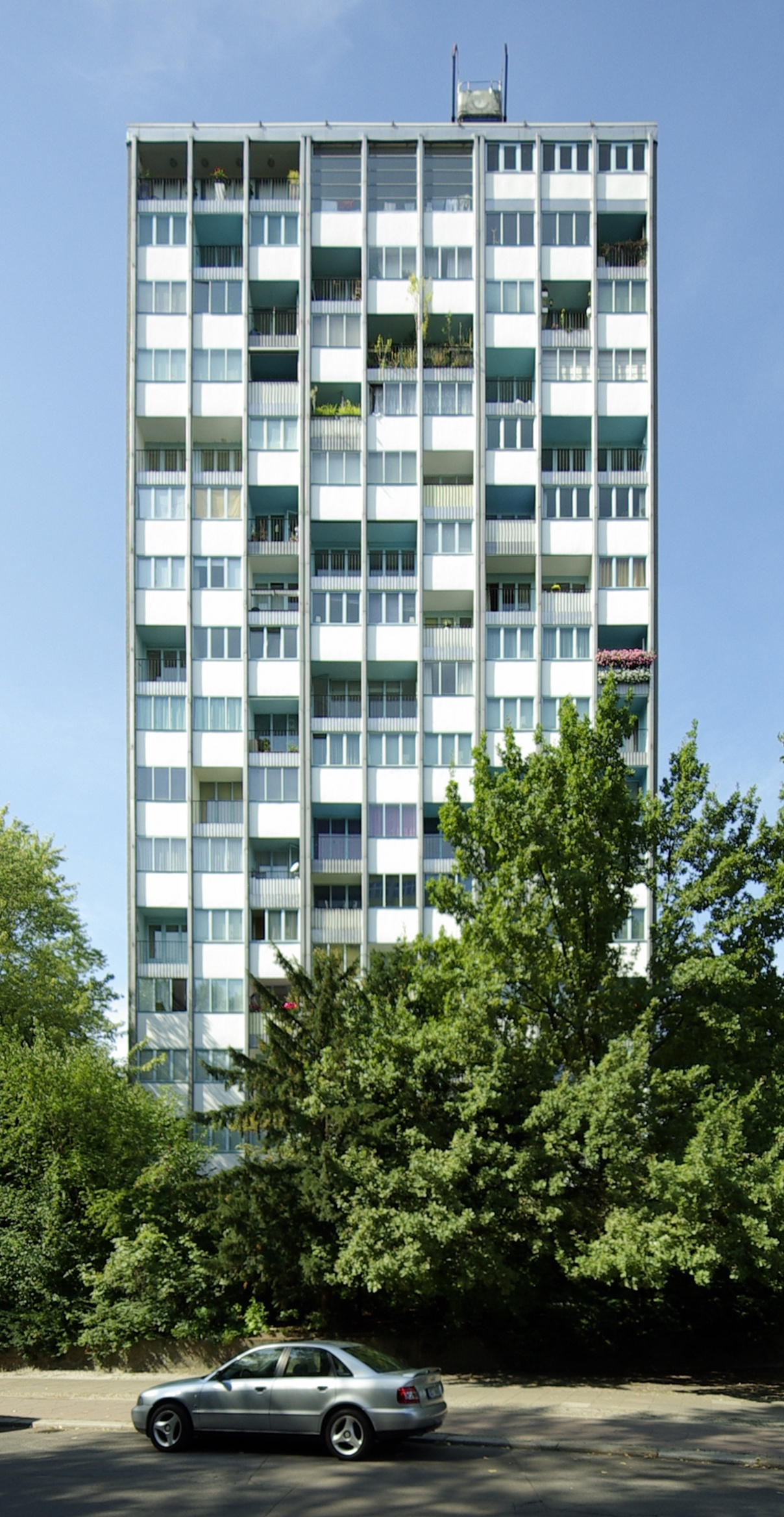 Punkthochhaus Bartningallee 11/13 in Berlin-Hansaviertel